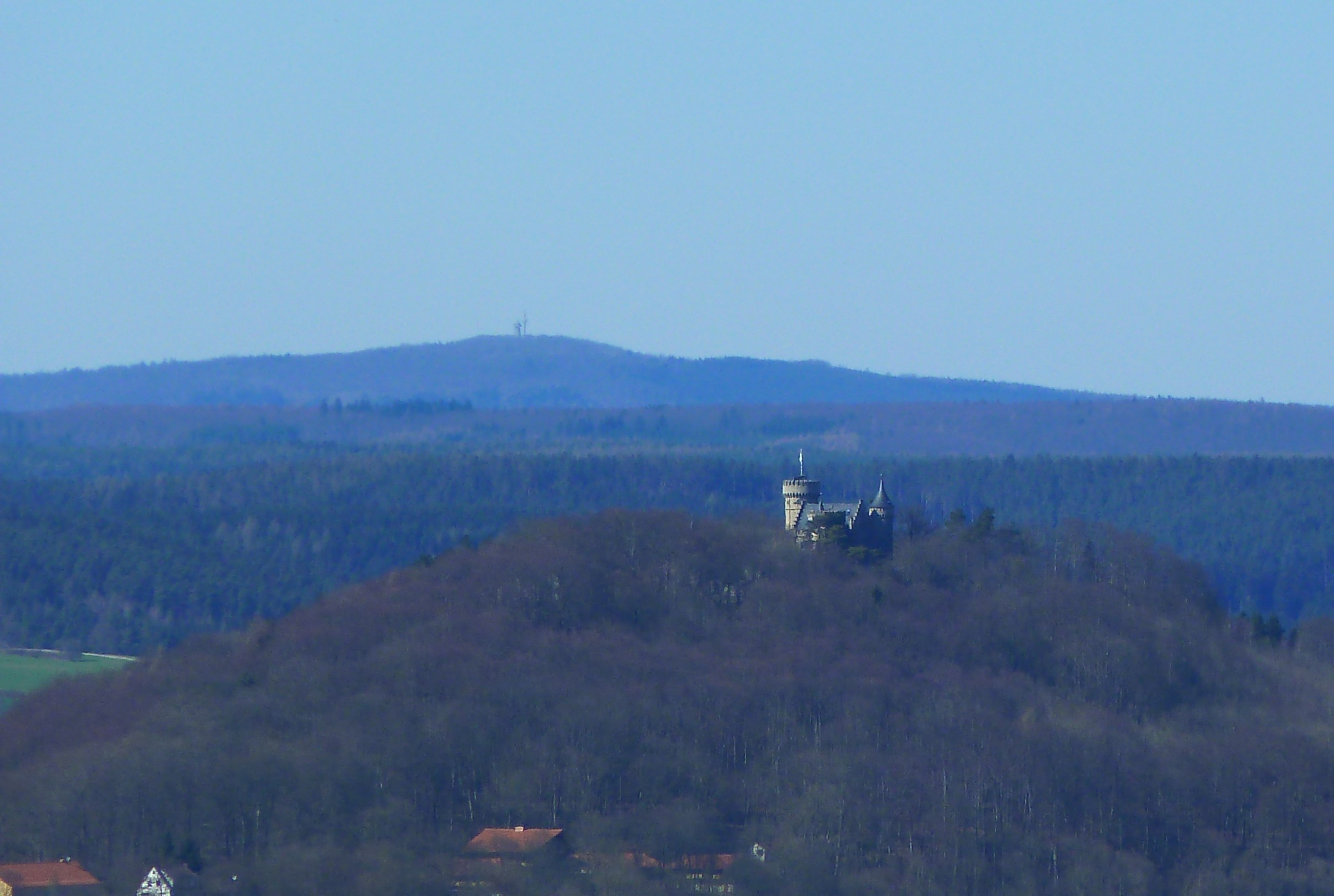 Der Berg Pleß bei Breitungen (Südwestthüringen), Blick von Meiningen - im Vordergrund das Schloss Landsberg